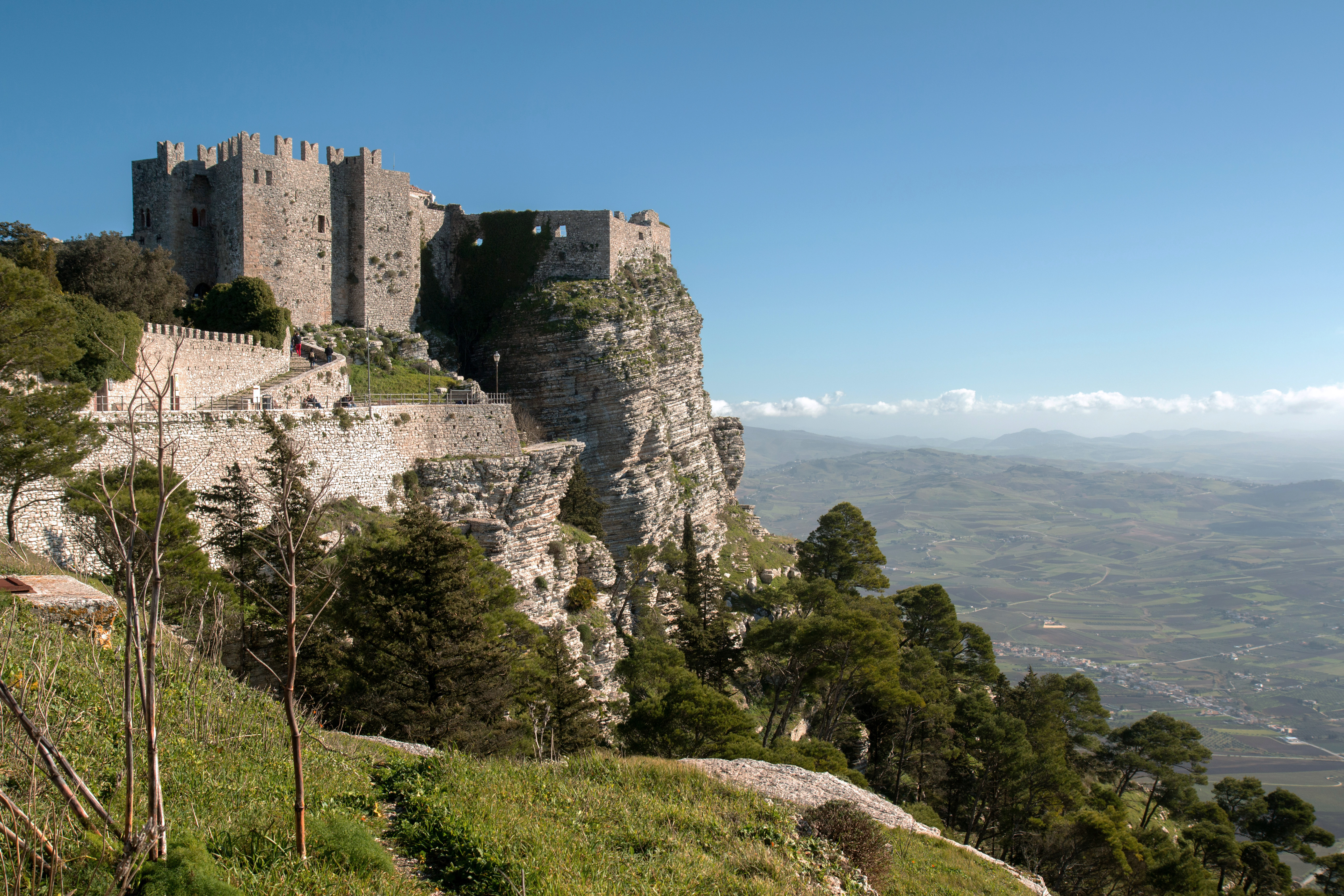 Erice